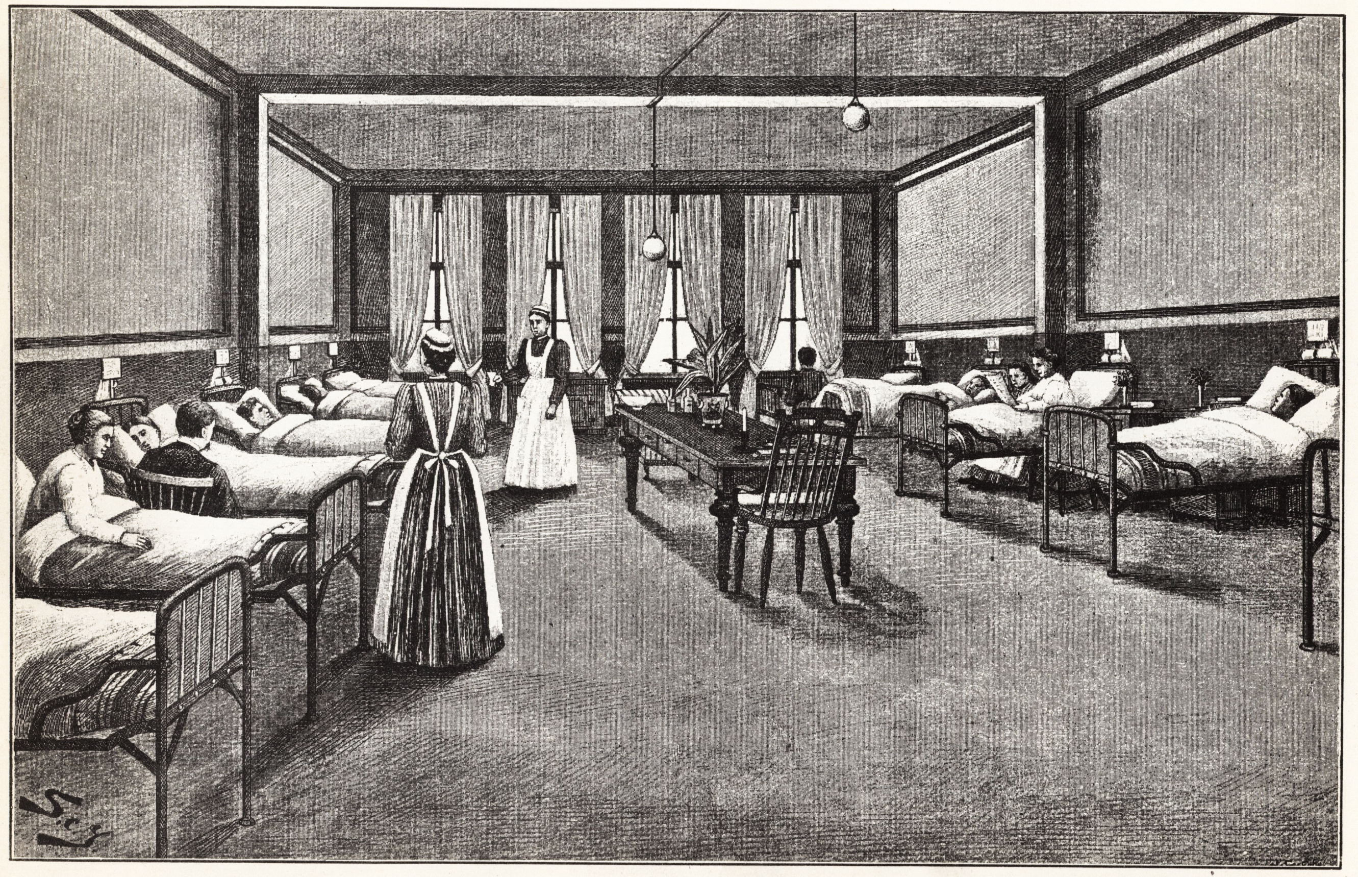 Serafimerlasarettet. Allmän sal efter ombyggnaden 1889-1893. Träsnitt i »Svenska familj-journalen Svea» 1894 efter teckning av Selma Jungberg